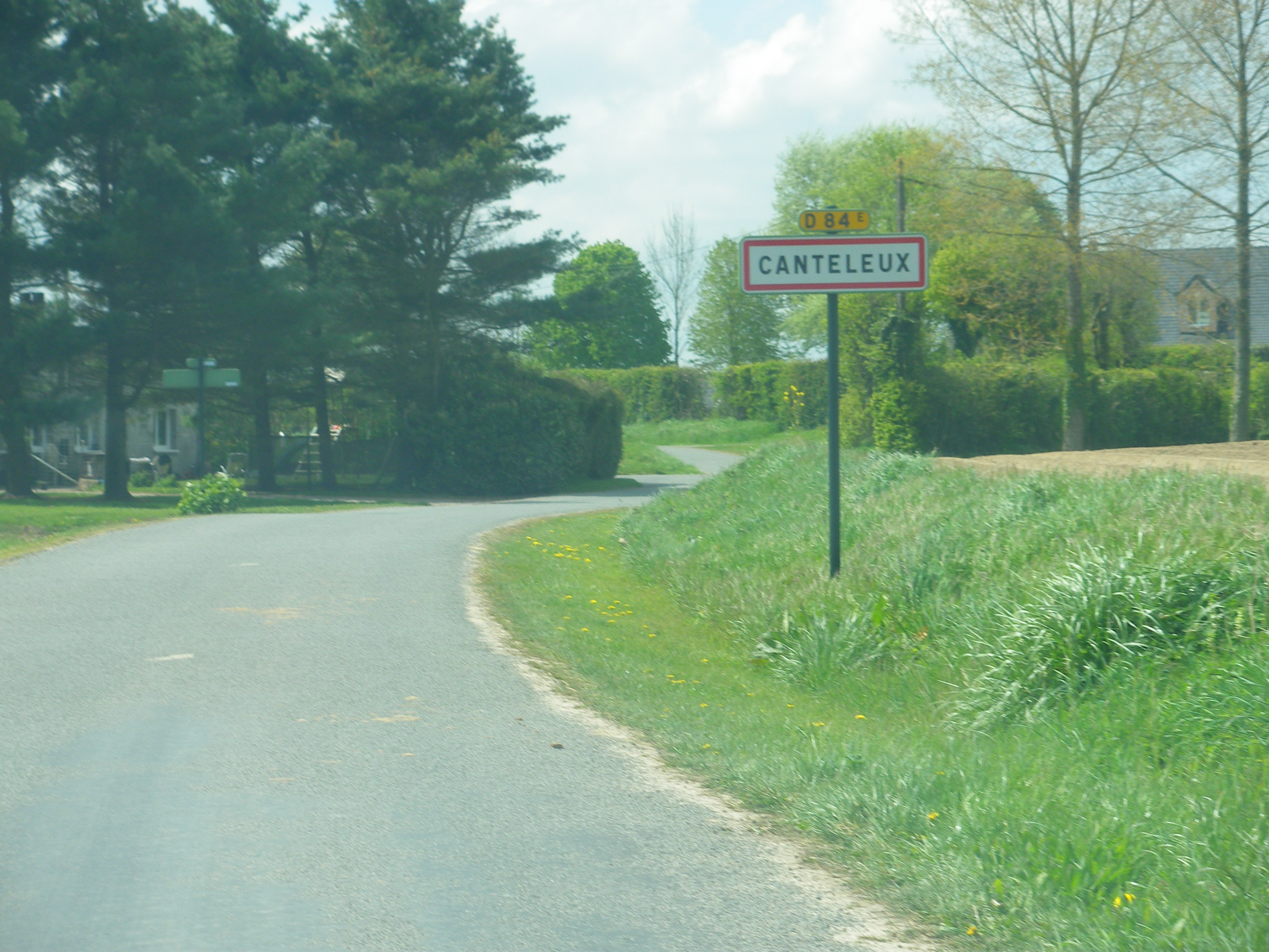 Vue d'une entrée de la commune de Canteleux.